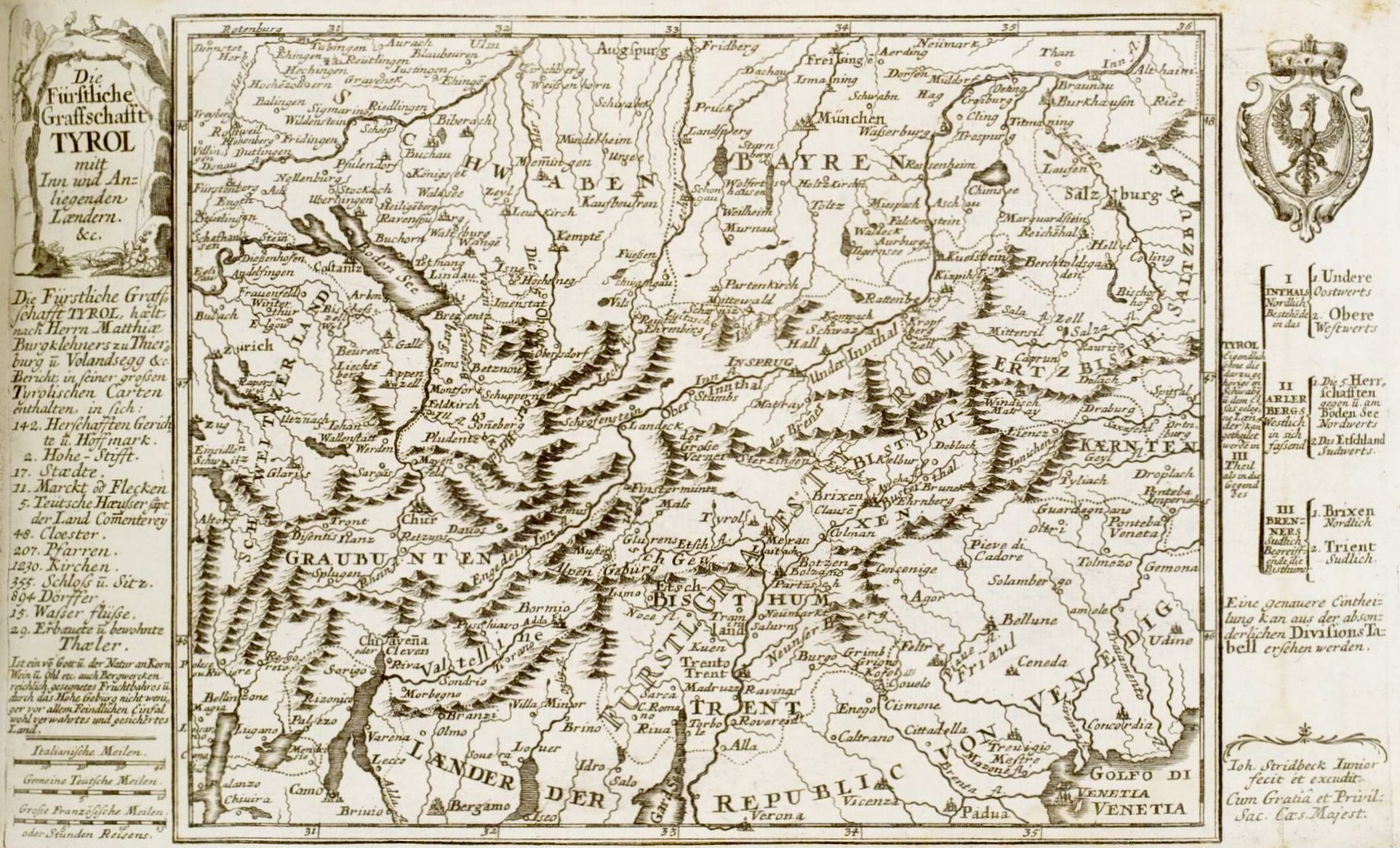 Curioses Staats und Kriegs Theatrum Dermahliger Begebenheiten im Tyrol : durch Unterschiedliche Geographische, Hydrographische, Topographische, Chronologische, Genealogische, Historische &c. Carten, Abrisse, und Tabellen Erlaeutert, Augspurg : Stridbeck, [ca. 1700] Fürstliche Graffschaft Tyrol